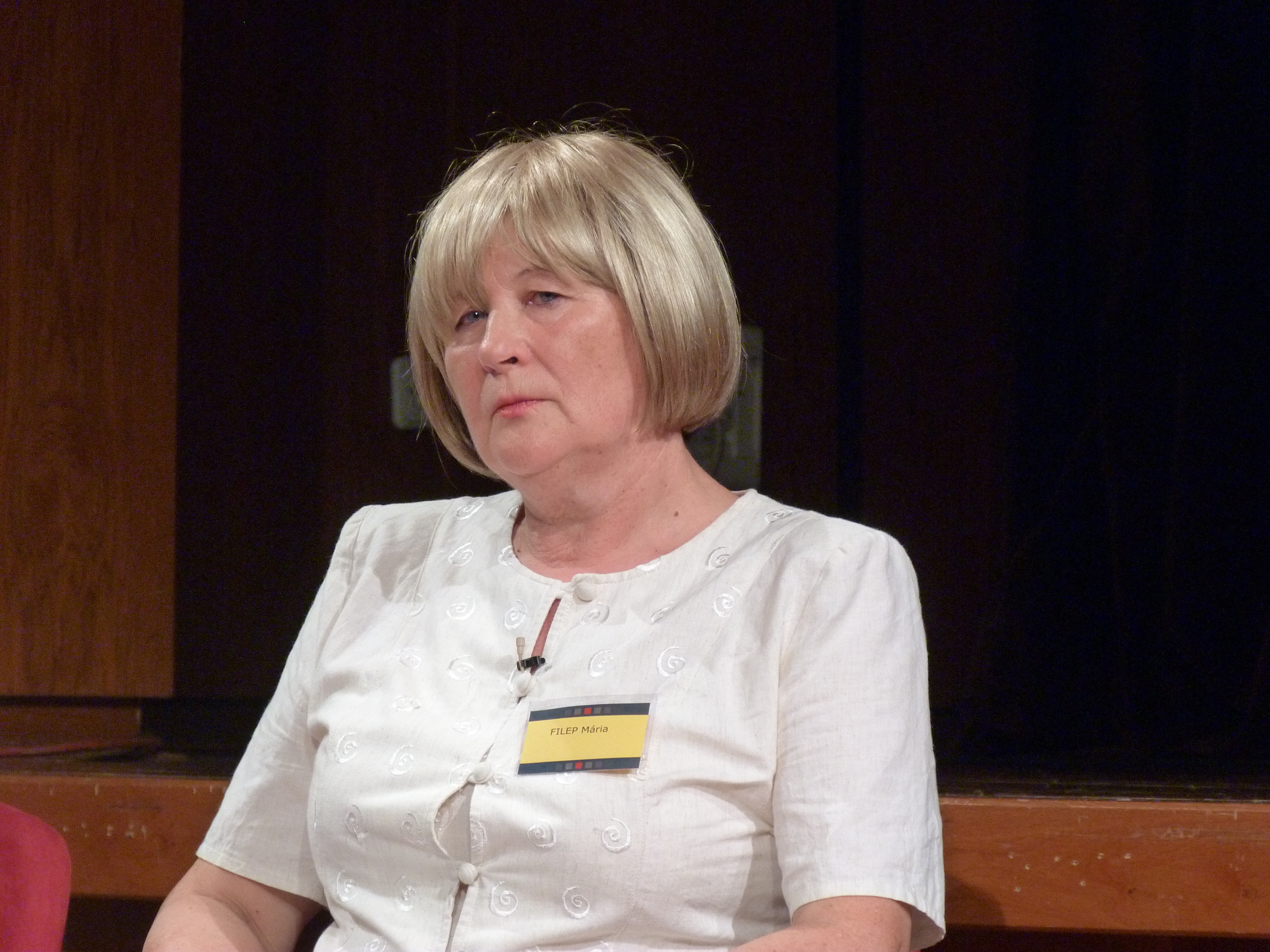 A felvétel 2014. augusztus 18-án, hétfőn készült Sopronban. Kapu a szabad Európa felé. 25 éves a Páneurópai Piknik. Konferenciát szervezett a Polgári Magyarországért Alapítvány a Konrad Adenauer Alapítvánnyal, az Antall József Tudásközponttal, a Páneurópai Piknik '89 Alapítvánnyal, Sopron Városával. Magas László.